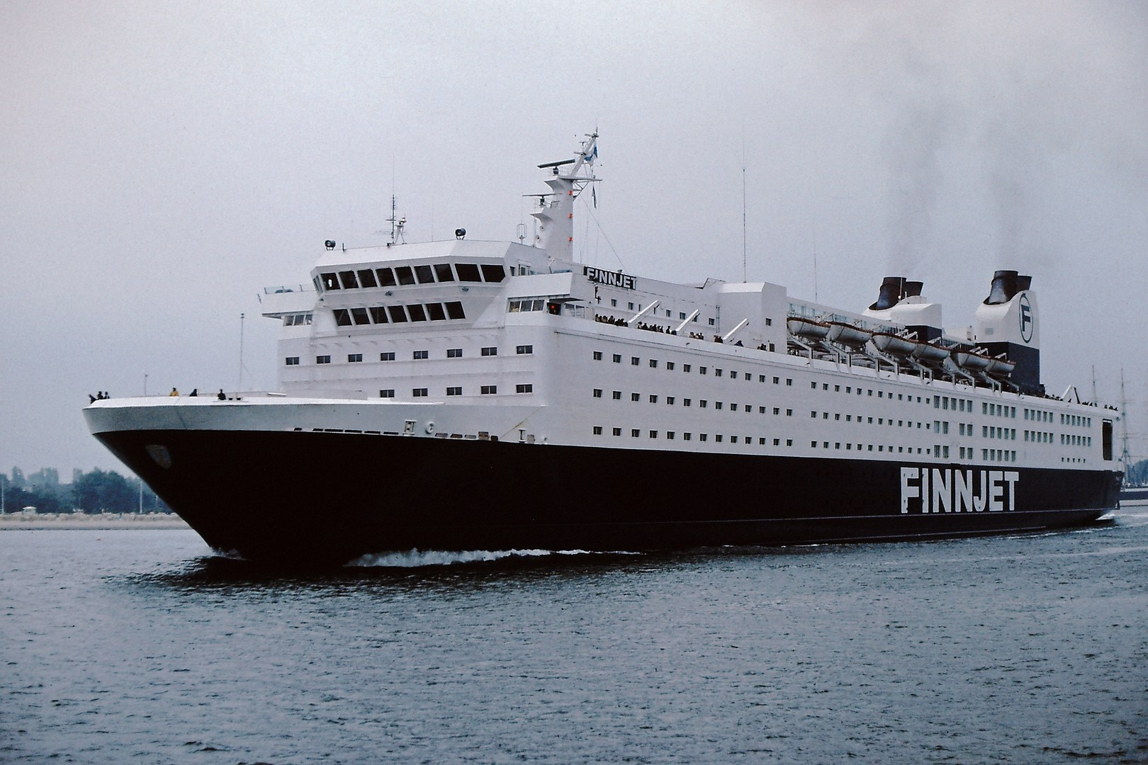 FS Finnjet auf der Finnland-Travemünde-Route, im Hafen von Travemünde IMO Number: 7359632 MMSI Number: 308676000 Callsign: C6VQ3 Length: 215 m Beam: 25 m